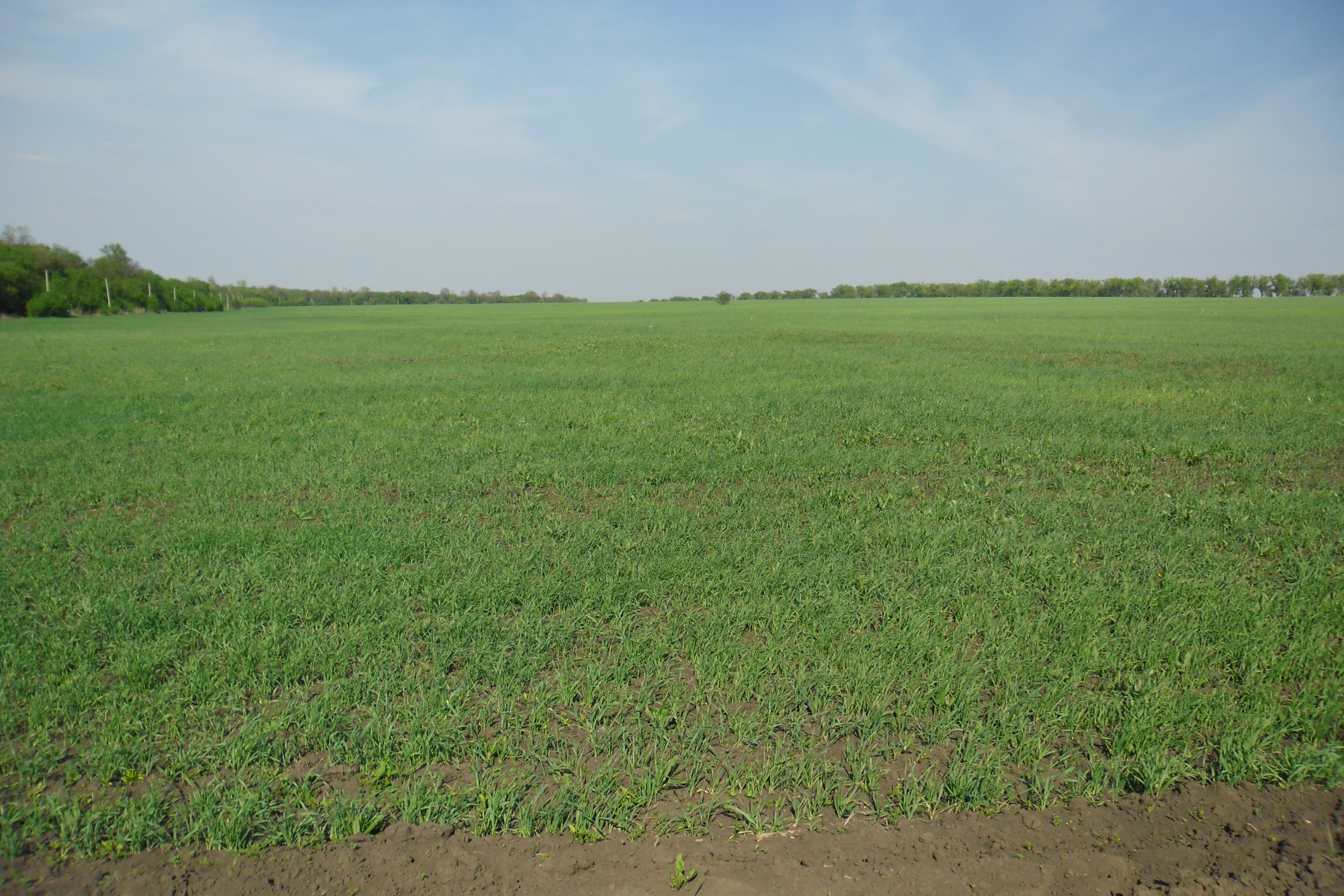 Фото